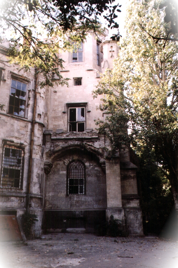 Шахский дворец, Одесса. До реконструкции